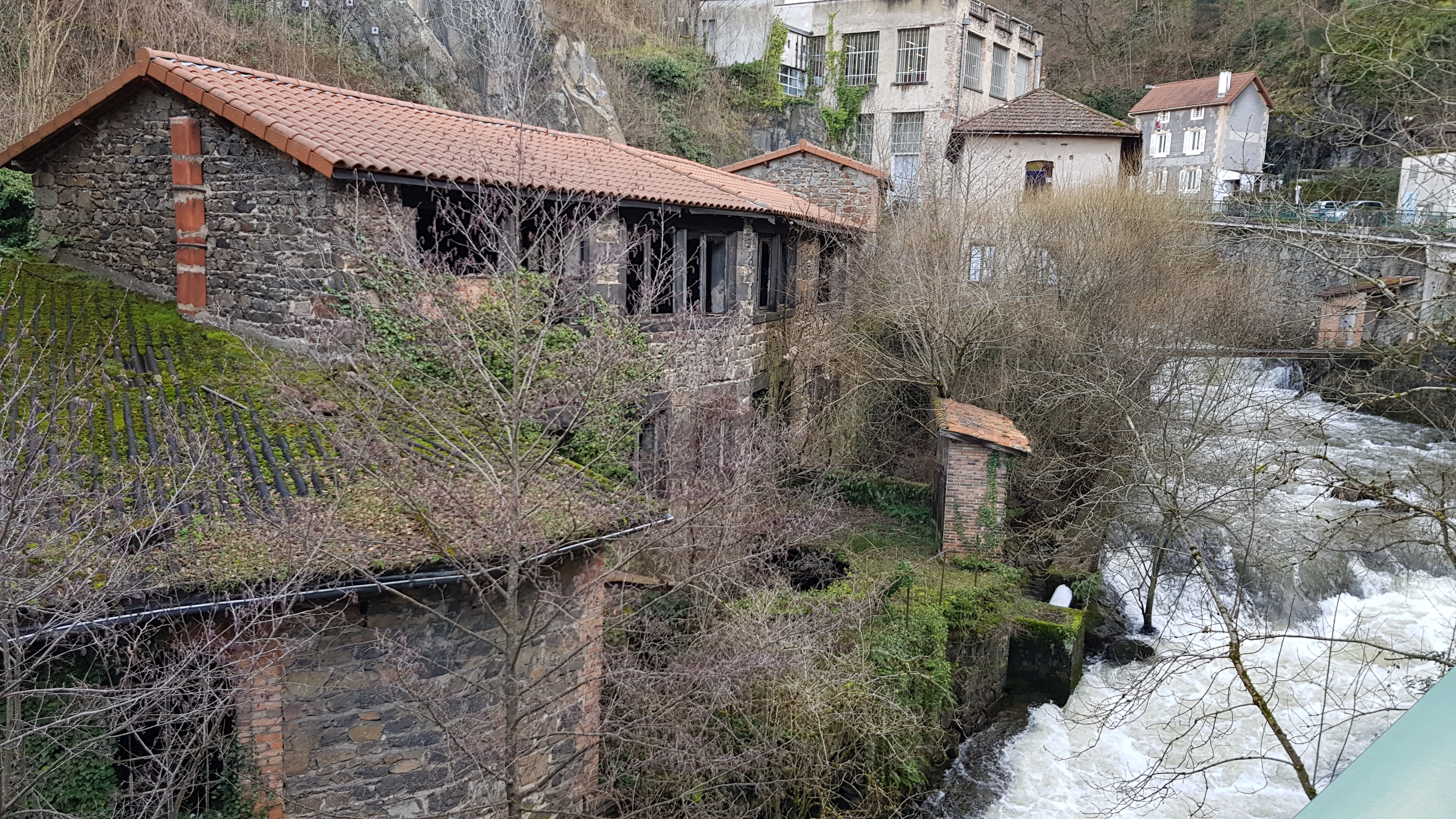 Bâtiment mis hors-d'eau